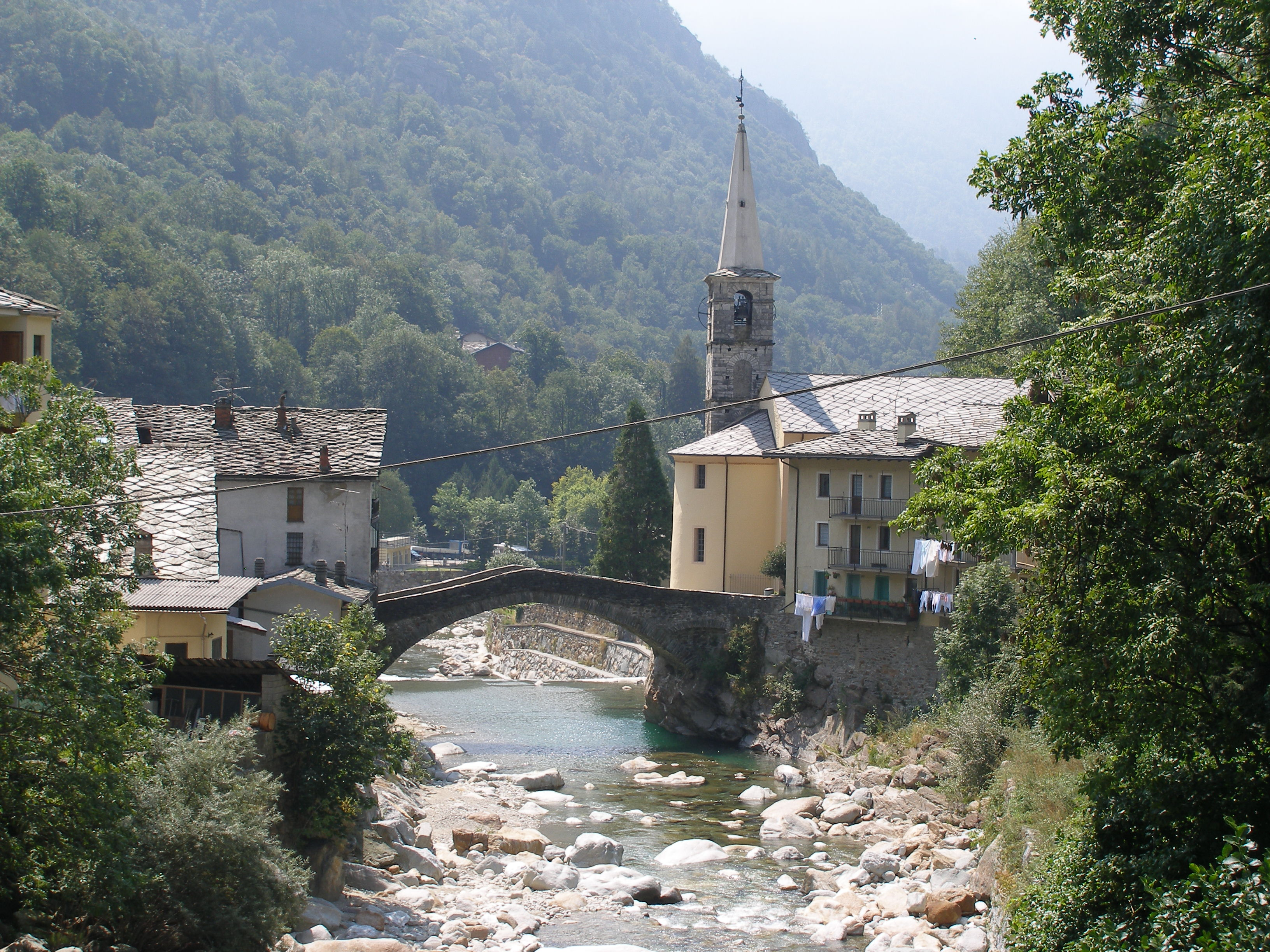 Fontainemore_- Aosta valley - Italy